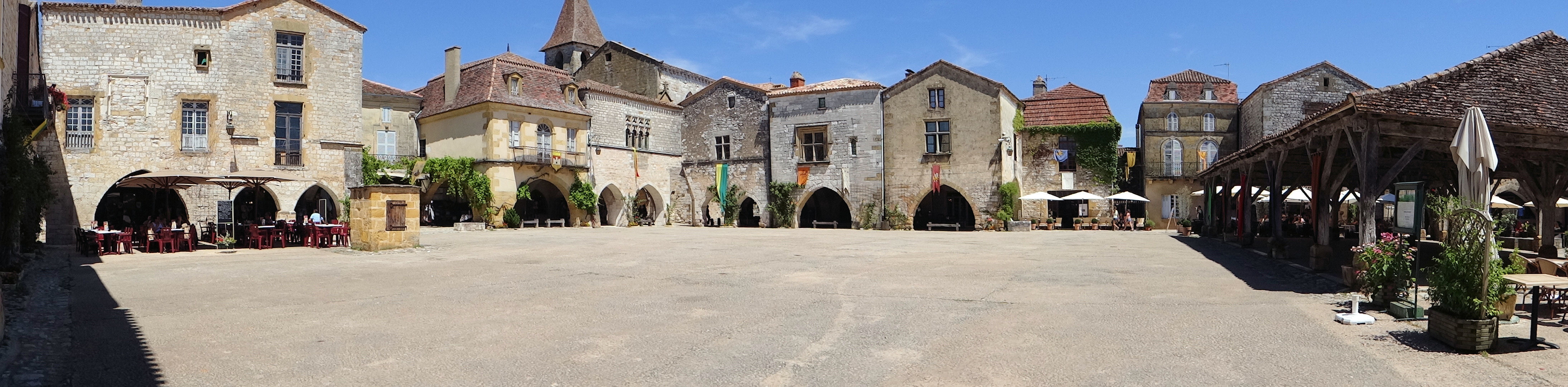 Monpazier - Une vue panoramique de la place des cornières